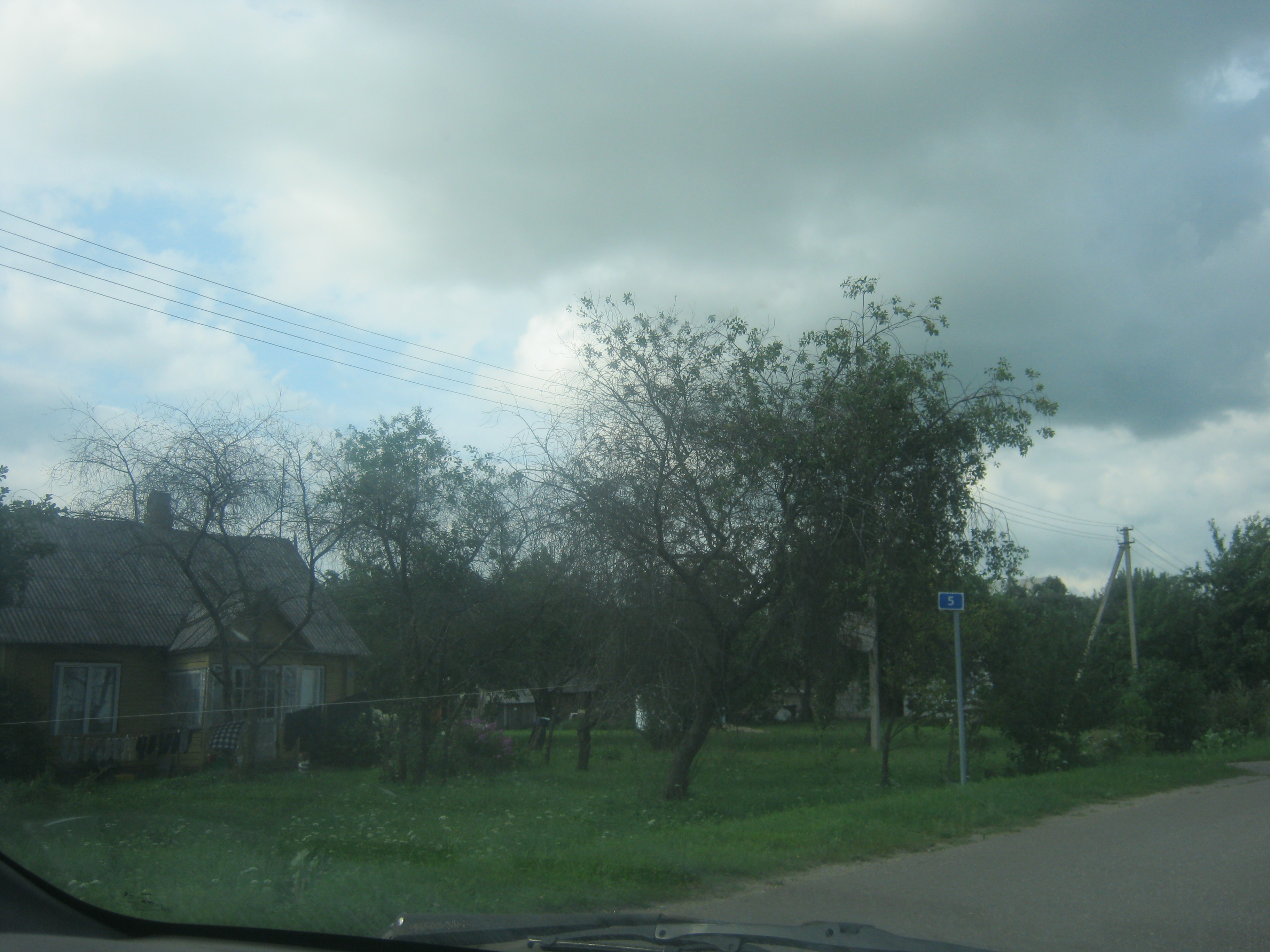 Žibavičiai